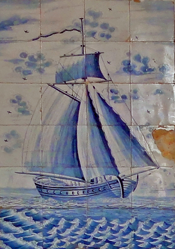 Hotel "De Prins", deel van de monumentale tegelwand, Kerkstraat 1 te Makkum